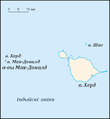 Астравы Херд і Макдоналд